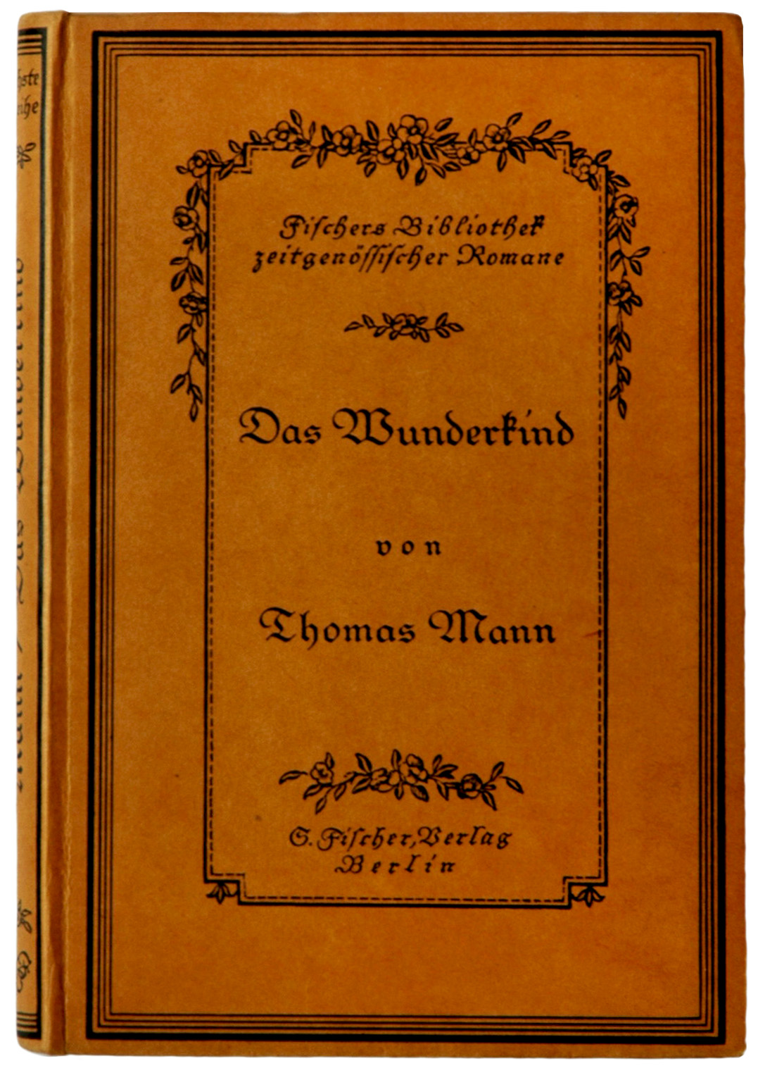 Als Titelerzählung in dem Novellenband von1914